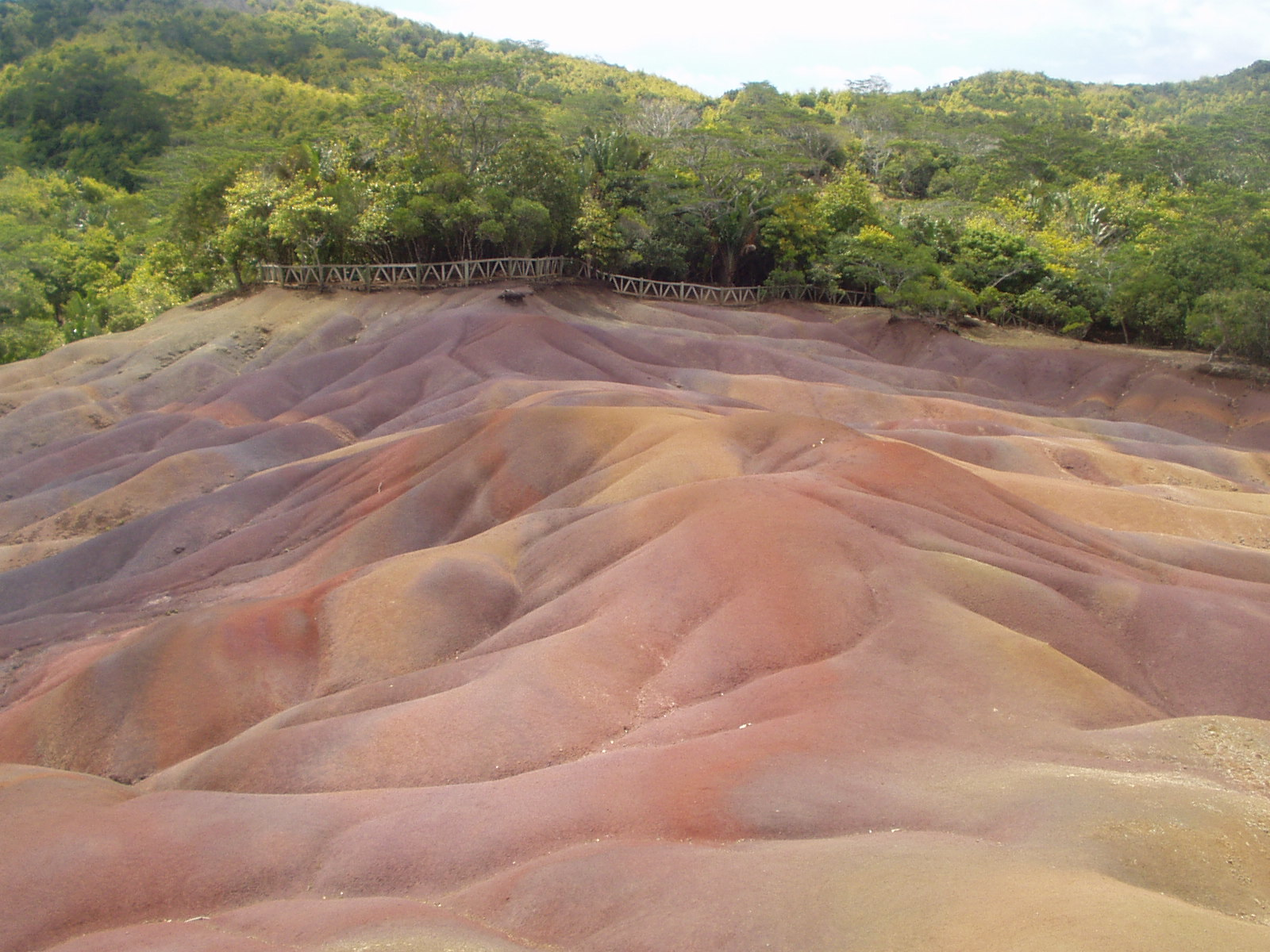 Colline, Chamarel, Mauritius